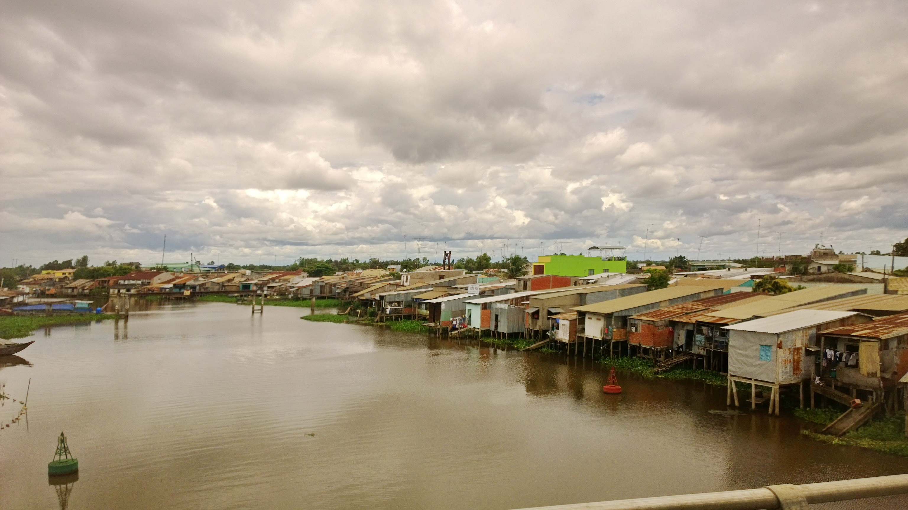 Cầu HÙng Vương,Rạch Cá Rô-tx. Kiến Tường, Long An, Việt Nam